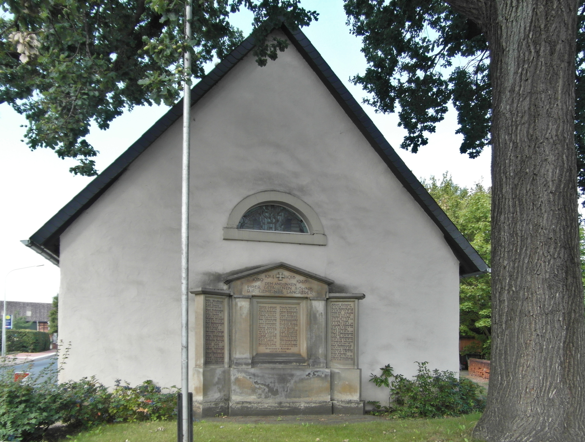 Das Ehrenmal an der Rückwand der denkmalgeschützten Kapelle in Langreder, Stadt Barsinghausen, Region Hannover, Niedersachsen